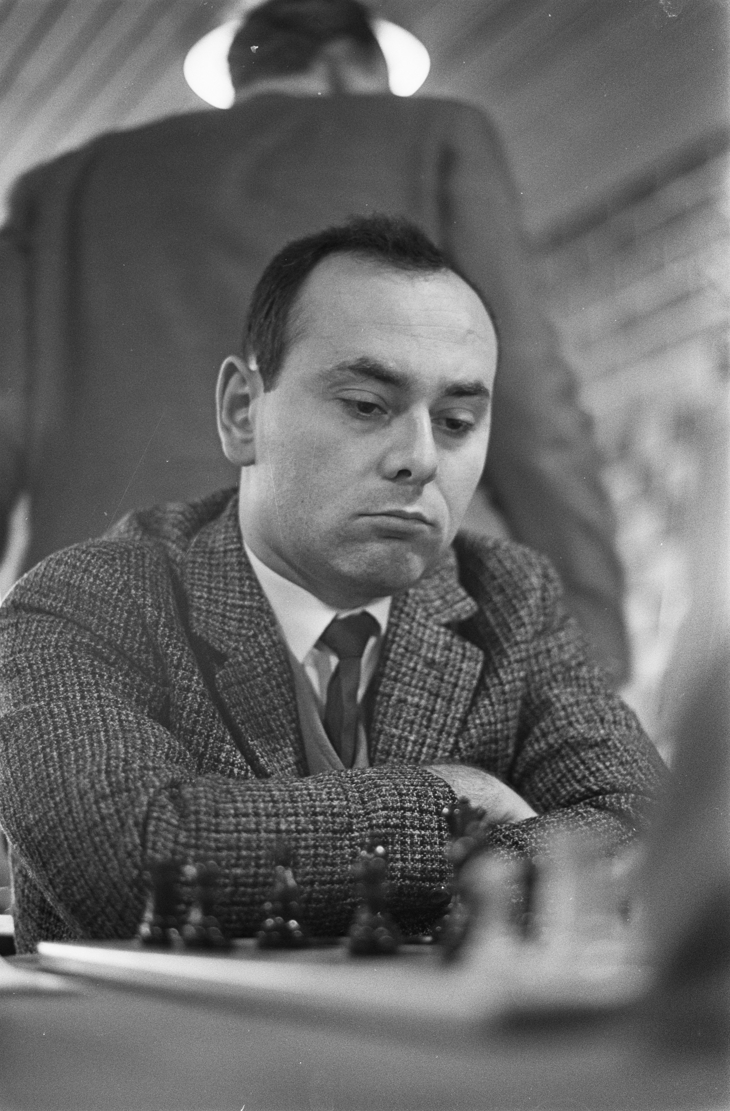 Hoogovenschaaktoernooi 1968, L. Portisch (Hongarije).